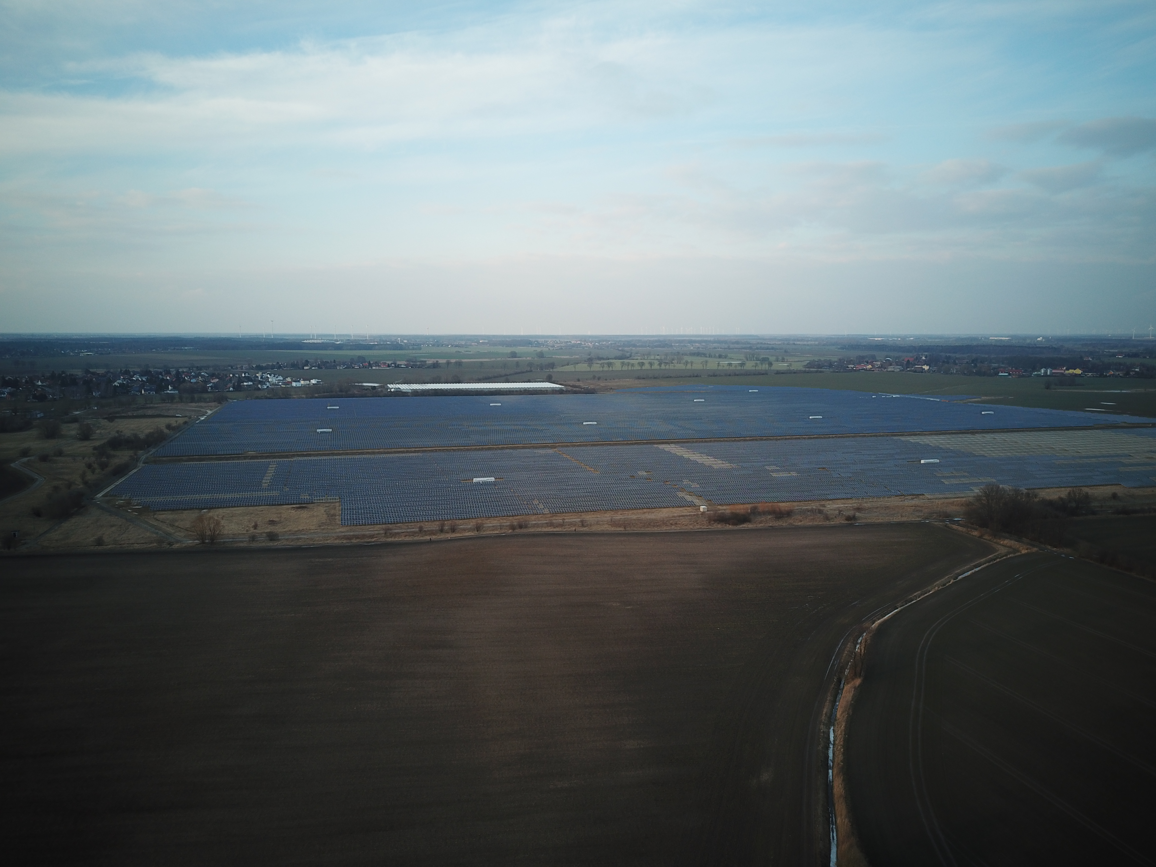 Solarpark Eiche von oben